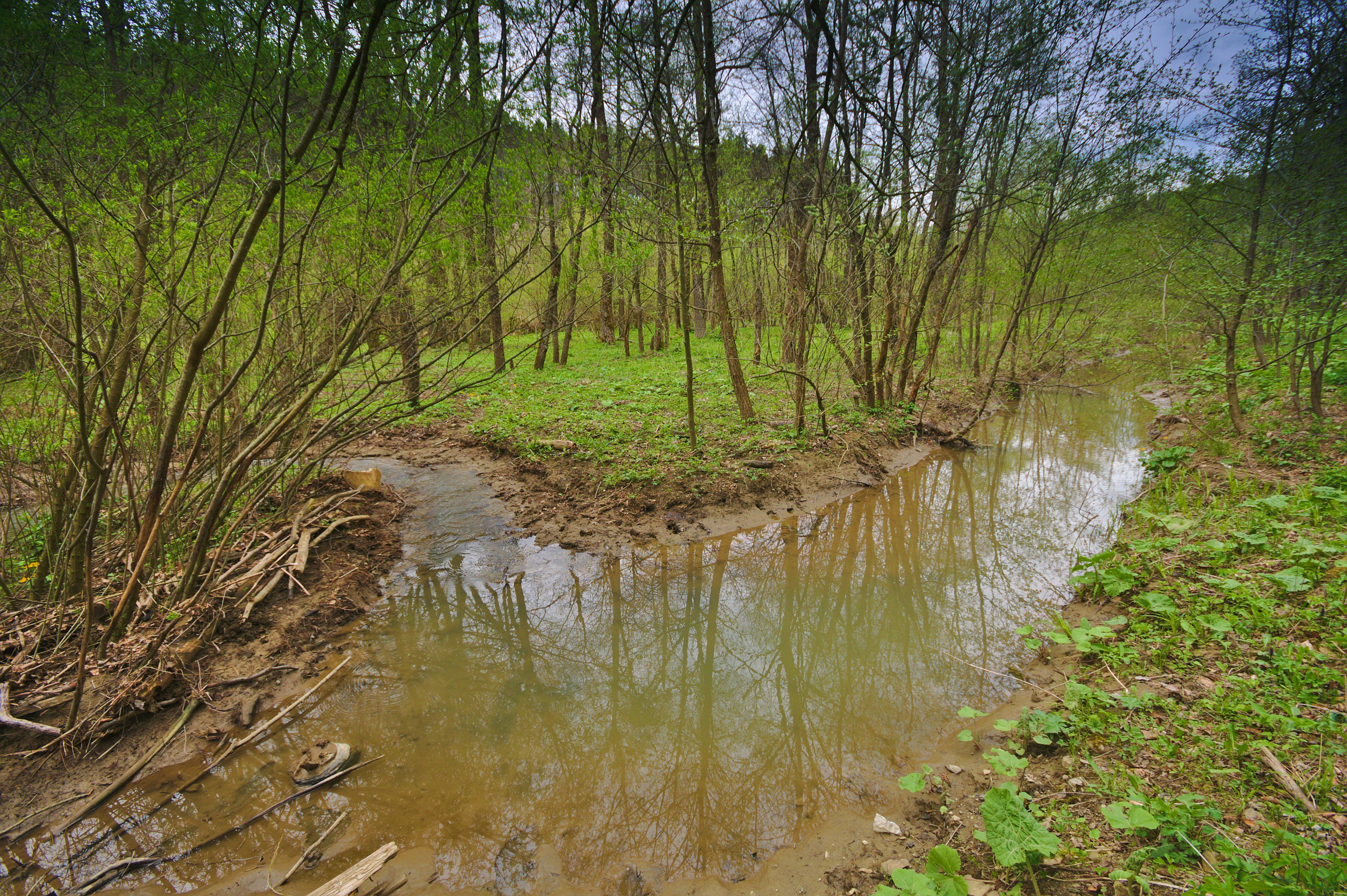 Přírodní rezervace Nebrová, okres Ilava